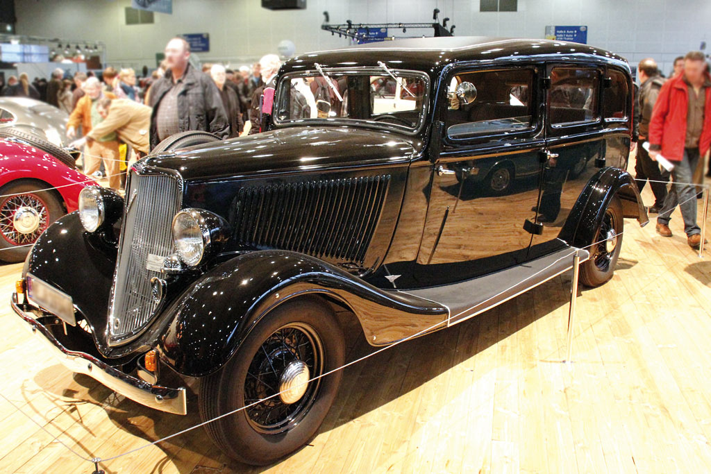 1934 Ford Rheinland Karosserie Hebmüller